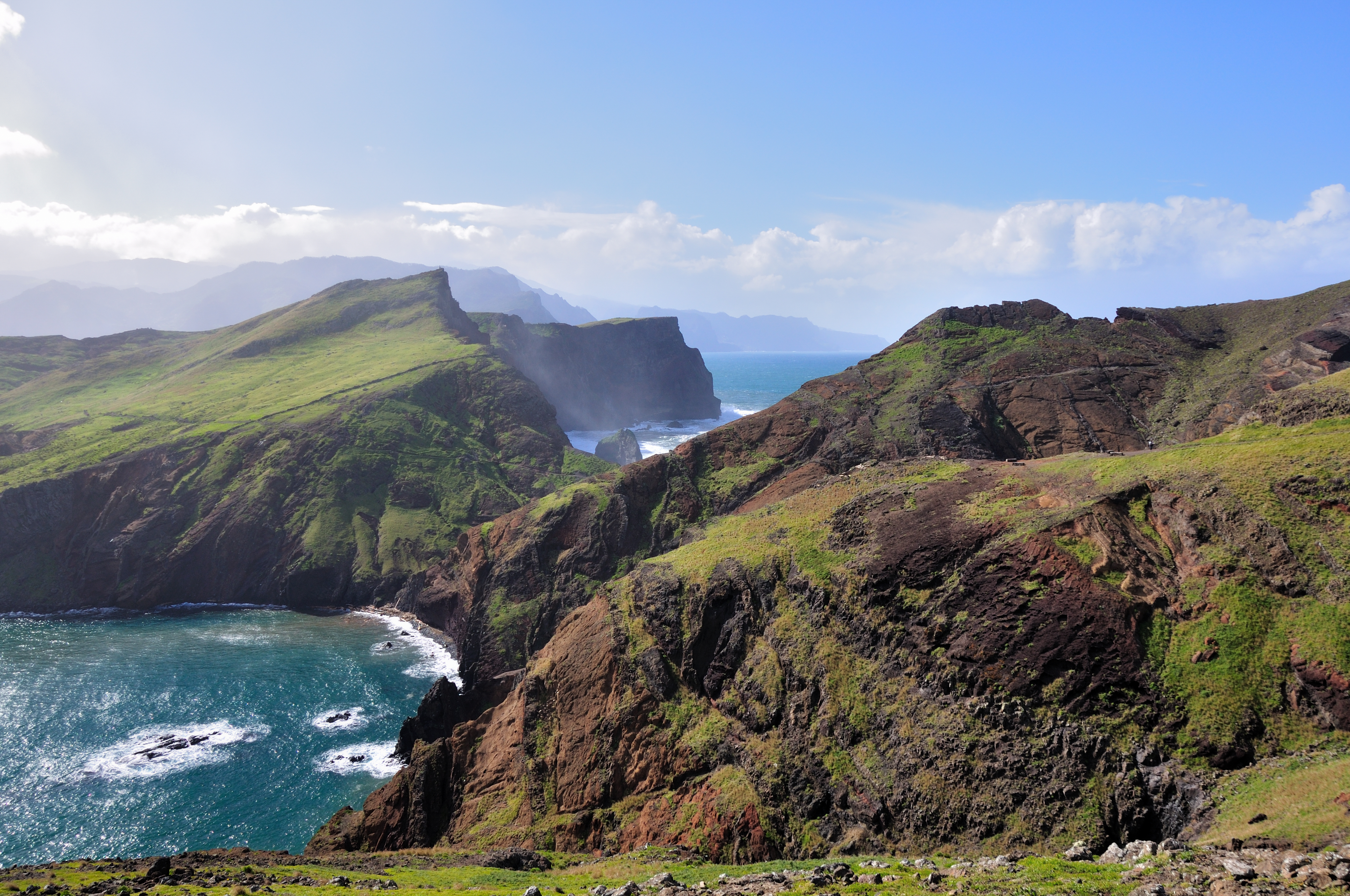 Portugal, Ponta de São Lourenço